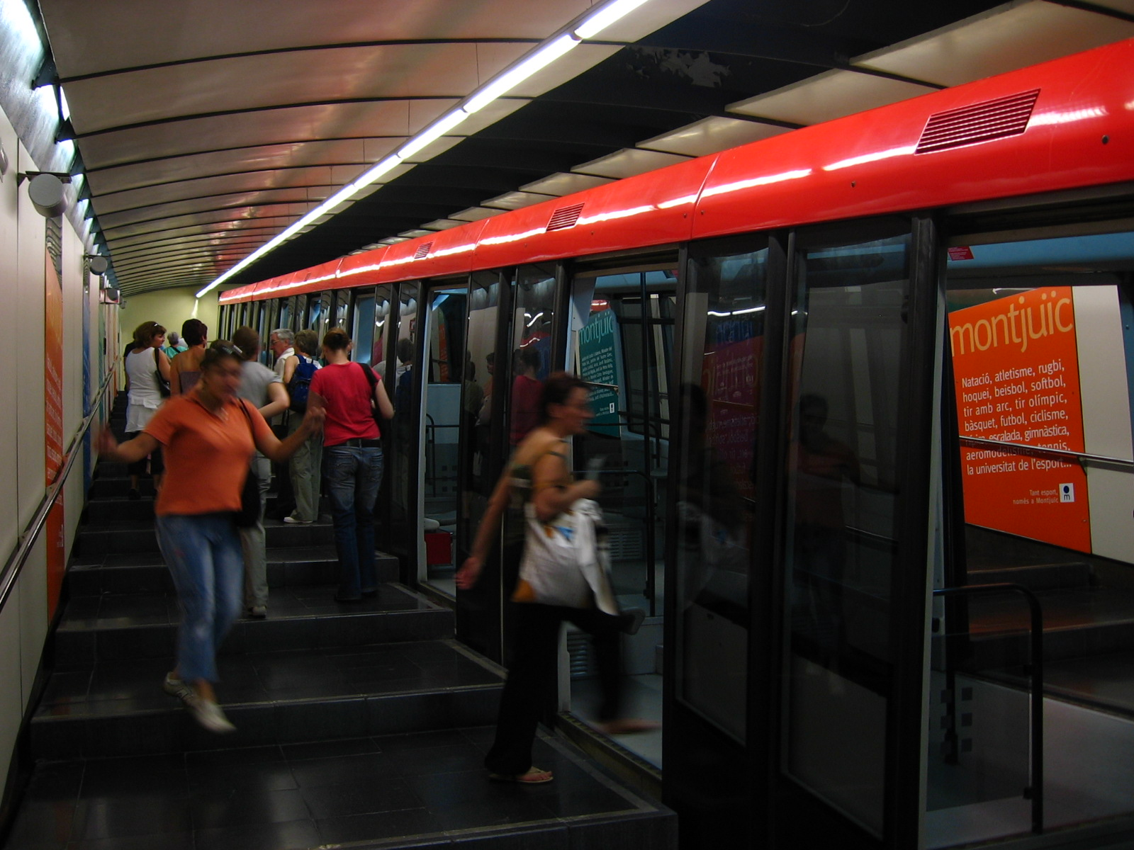 Interior of the Parc de Montjuïc station on the Funicular de Montjuïc, Barcelona/Interior de l'estació Parc de Montjuïc del Funicular de Montjuïc, Barcelona